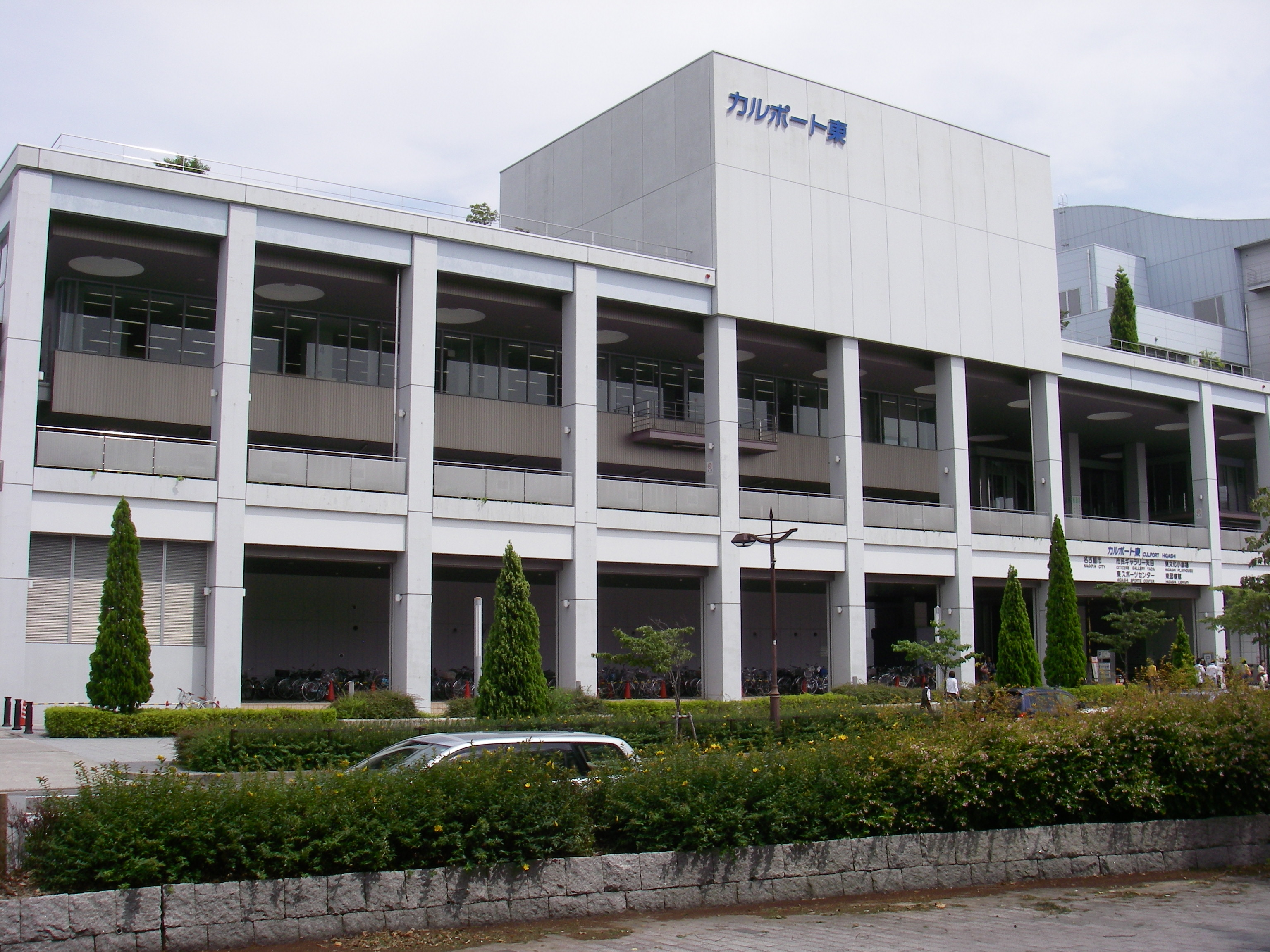 カルポート東（愛知県名古屋市東区） 東図書館・東スポーツセンター・東文化小劇場他の複合施設